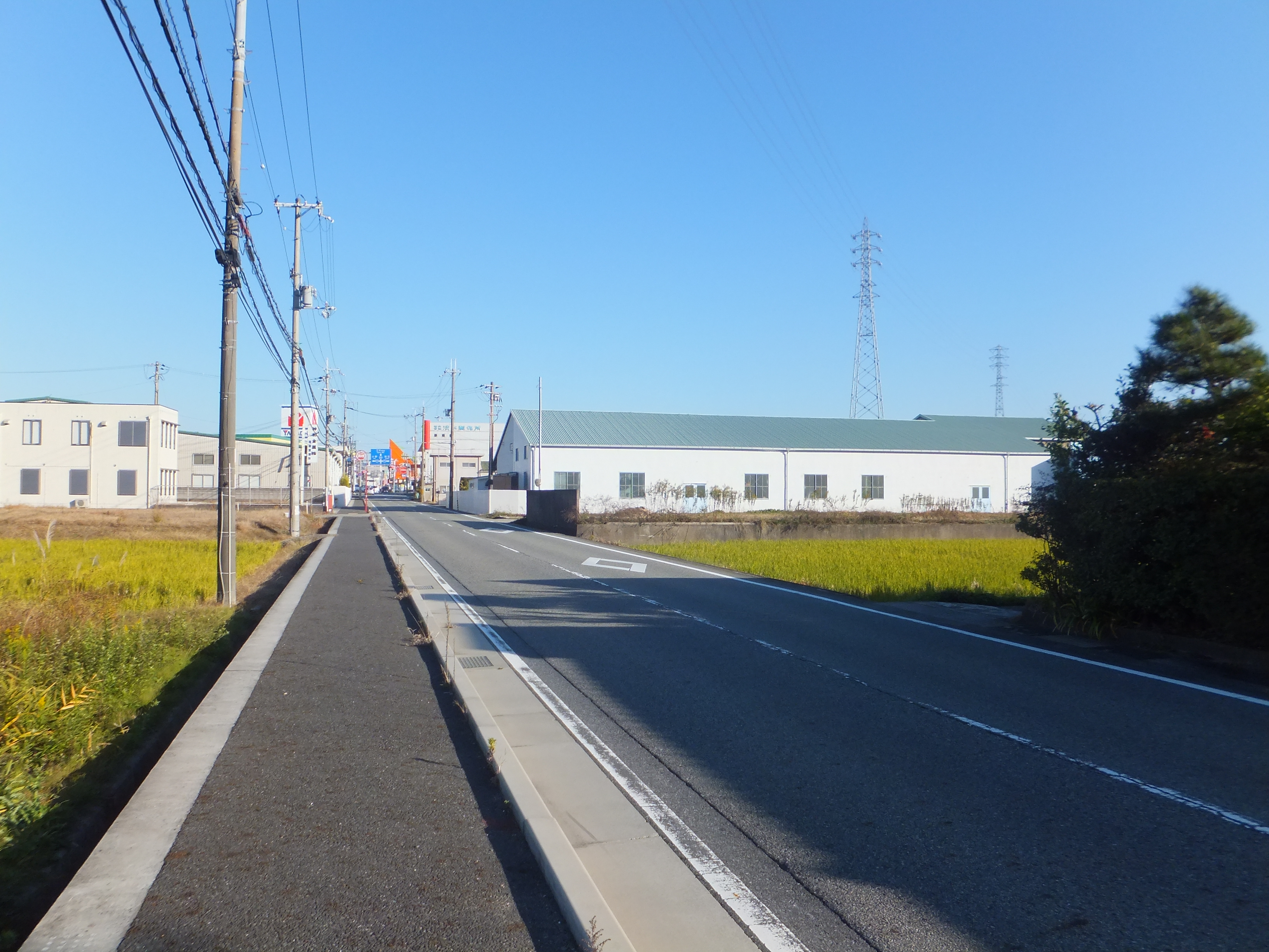 兵庫県三木市鳥町 兵庫県道360号正法寺三木停車場線